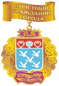 Нагрудный знак «Почётный гражданин города Чебоксары» (орден) Нагрудный знак «Почетный гражданин города Чебоксары» представляет собой объемно-рельефное изображение оригинального герба города Чебоксары. Цветные части герба покрыты эмалью красного, голубого, фиолетового и белого цвета. Фон герба темно-бронзового цвета имеют шероховатую поверхность. Размер знака (ордена) шириной 37,8, высотой 38,4 мм, знак имеет толщину 3,5 мм. Реверс знака (ордена) имеет силуэт аверса, гладкой, слегка выдавленной формы цвета фона герба. Знак при помощи ушка и овального звена соединяется с колодкой. Колодка имеет тот же цвет, что и фон герба. Форма колодки является стилизованным изображением горизонтально развернутой «грамоты», на которой по форме изгиба колодки легким рельефом нанесена надпись «ПОЧЁТНЫЙ ГРАЖДАНИН ГОРОДА». Габаритный размер колодки - ширина 35,4 мм, высота 13,8 мм. На реверсе колодки имеется булавочное крепление.